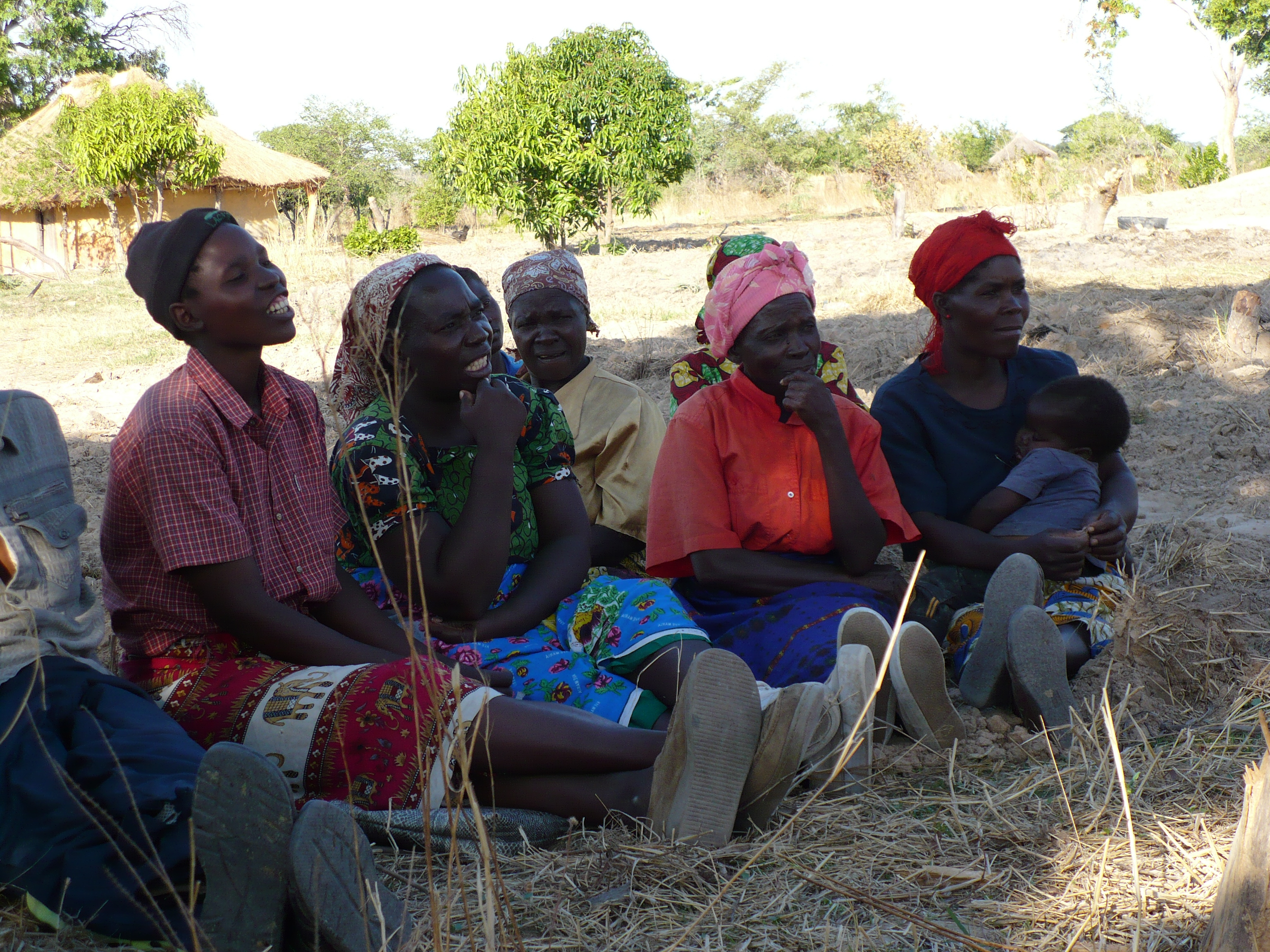 Zambian rural village. Women smallholders